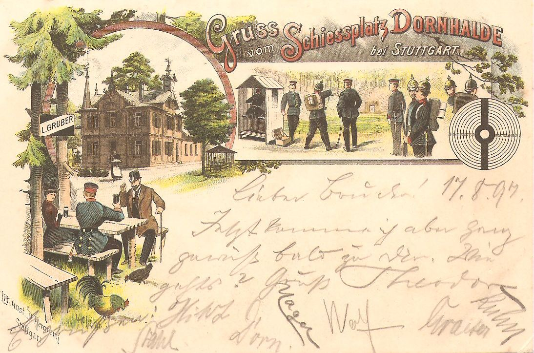 „Gruß vom Schießplatz Dornhalde“, Garnisonsschützenhauses in Stuttgart-Degerloch, Ansichtskarte von 1897. Lithographische Anstalt Herrmann Stuttgart